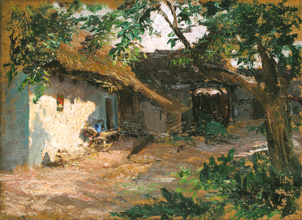 Bauernhof in Etzdorf